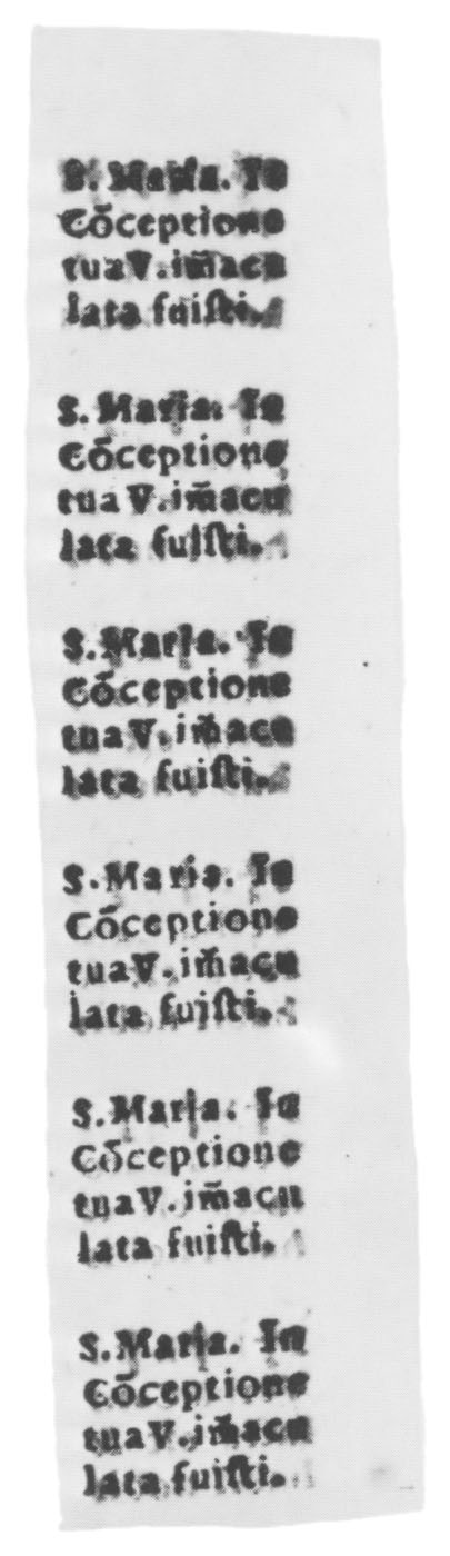 Ein Streifen Esszettel. Lateinischer Text: Sancta Maria, in Conceptione tua Virgo immaculata fuisti. Übersetzung: Heilige Maria, in deiner Empfängnis warst du unbefleckte Jungfrau.